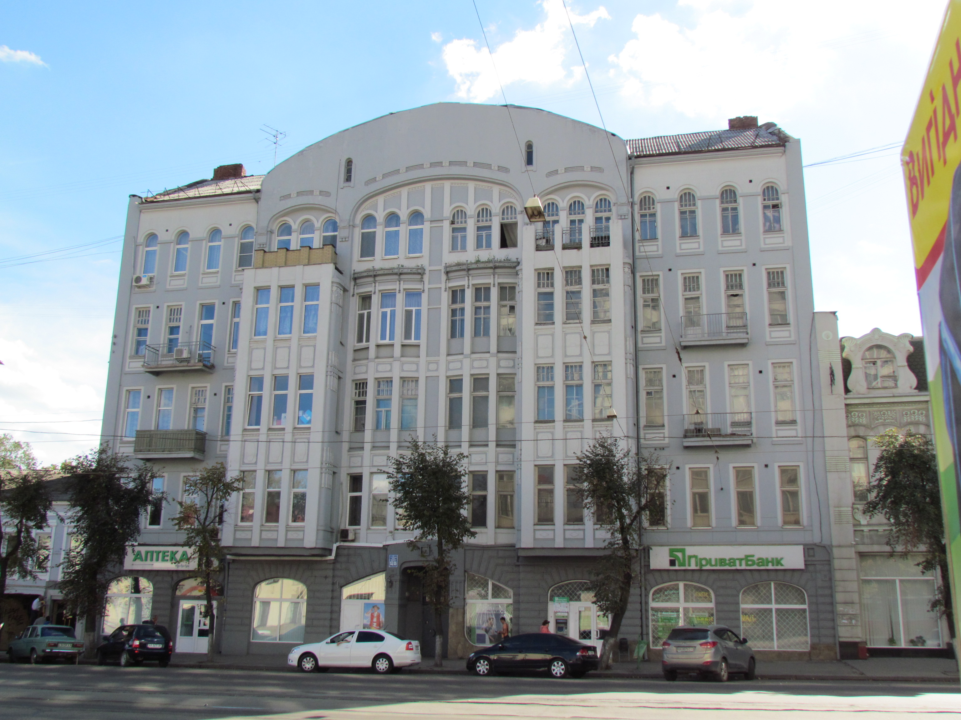 Україна, Харків, вул. Полтавський Шлях, 53-55